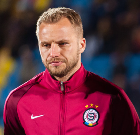 «Ростов» - «Спарта» (16.02.2017)